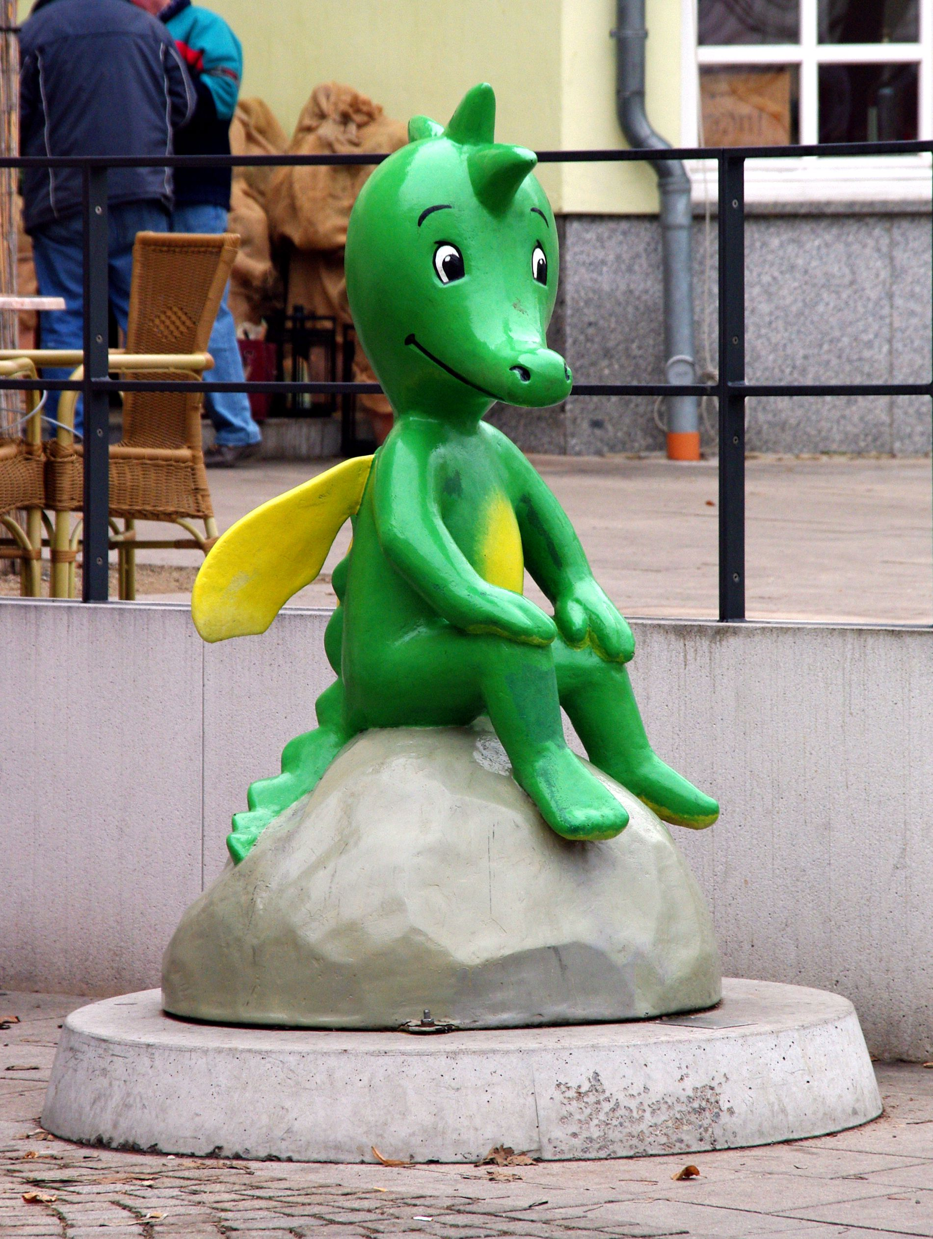 Die Figur des kleinen grünen Drachens Tabaluga am Rande des Hirschgartens in Erfurt.